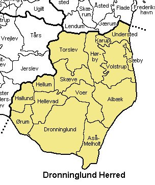 Dronninglund Herred, Hjørring Amt, Denmark